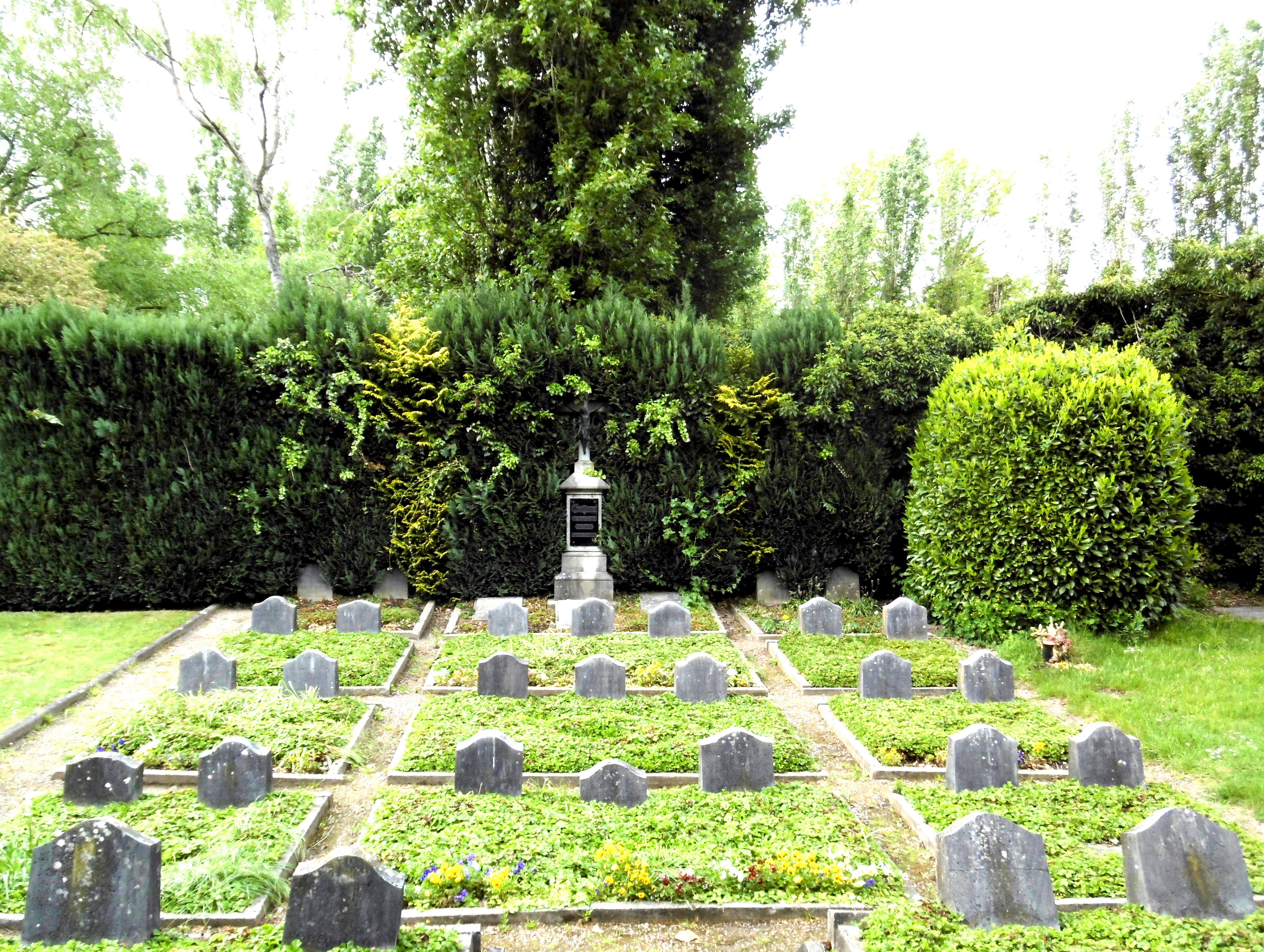 Grabstätte der Armen-Brüder vom hl. Franziskus auf dem Ostfriedhof in Aachen